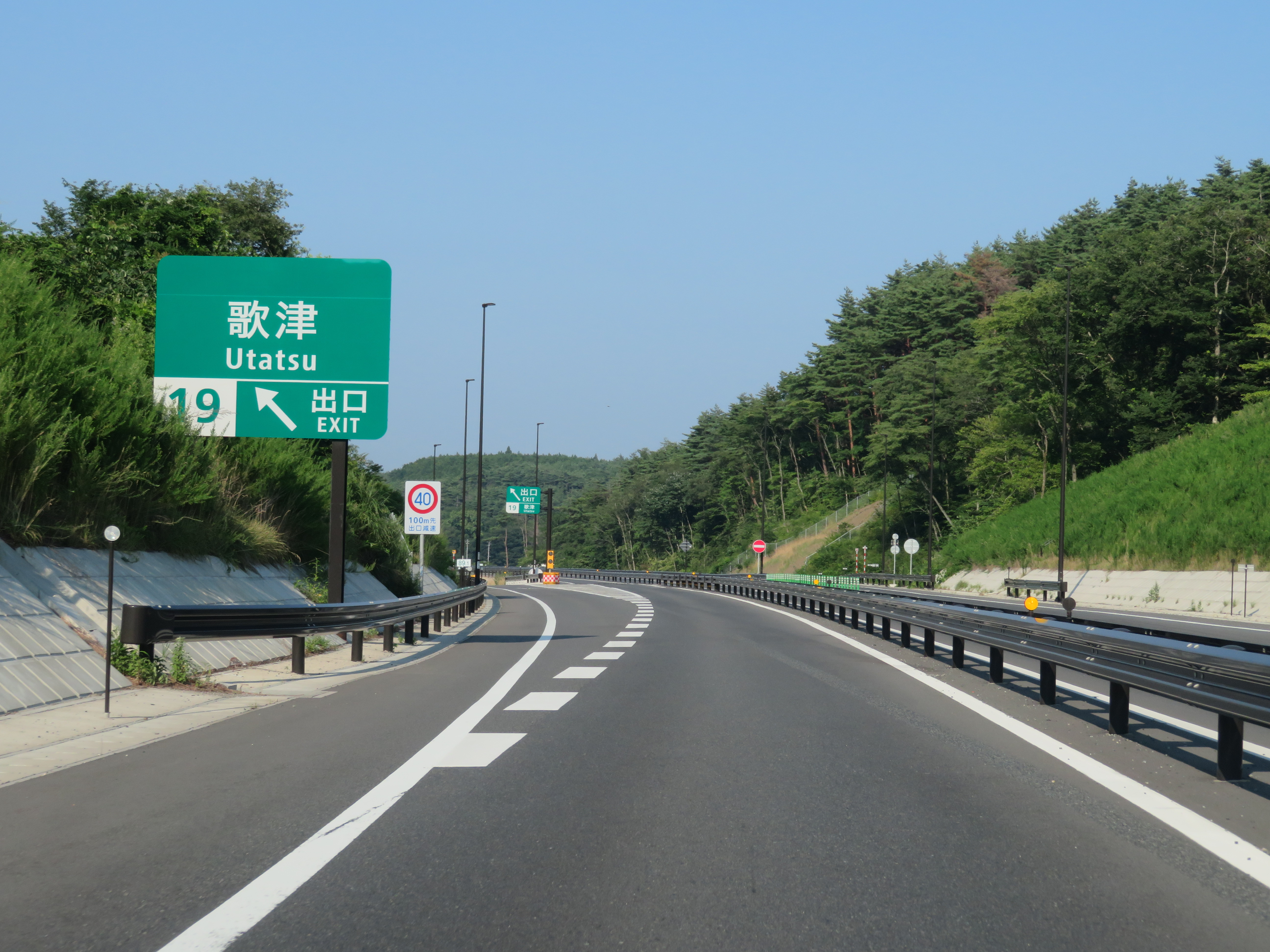 三陸自動車道 歌津インターチェンジ出口付近（志津川ＩＣ方面側から撮影）